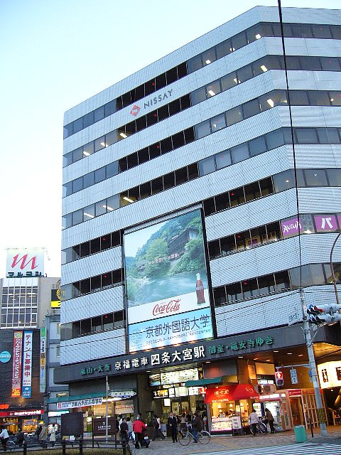 京福電気鉄道（嵐電） 四条大宮駅 駅ビル 2006年3月 Bakkai撮影